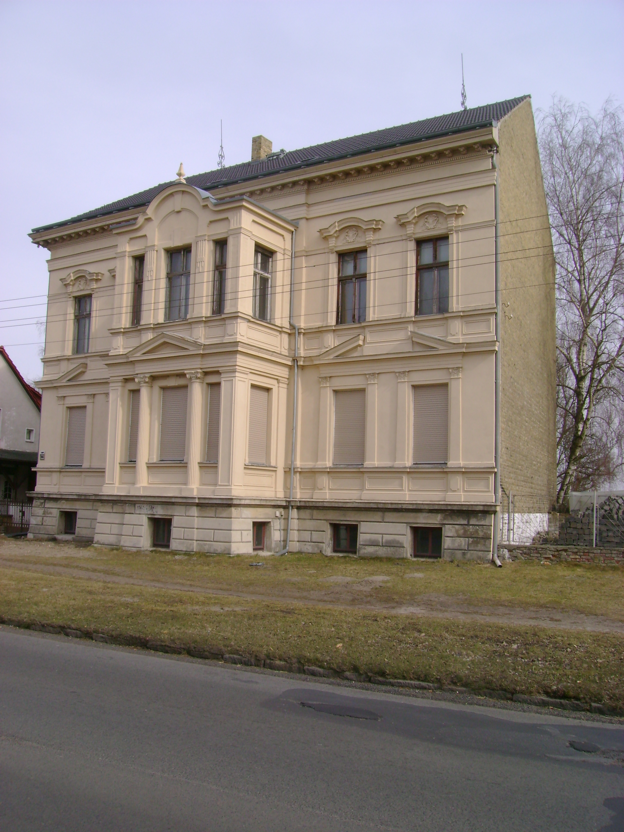 Denkmalgeschütztes Wohnhaus in Velten Breite Straße 94.